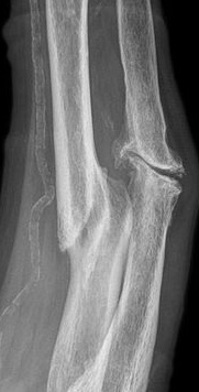 in Fehlstellung verheilte Radiusfraktur und hypertrophe Pseudarthrose der Ulna.